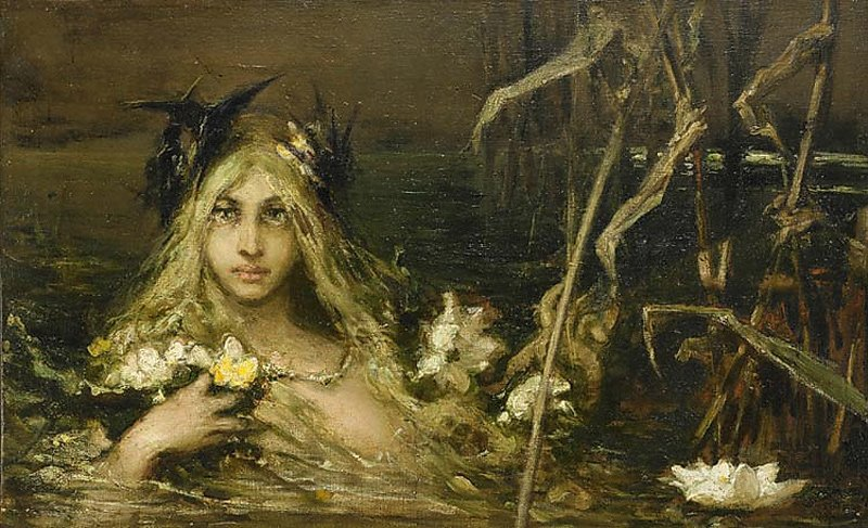 Водяная нимфа